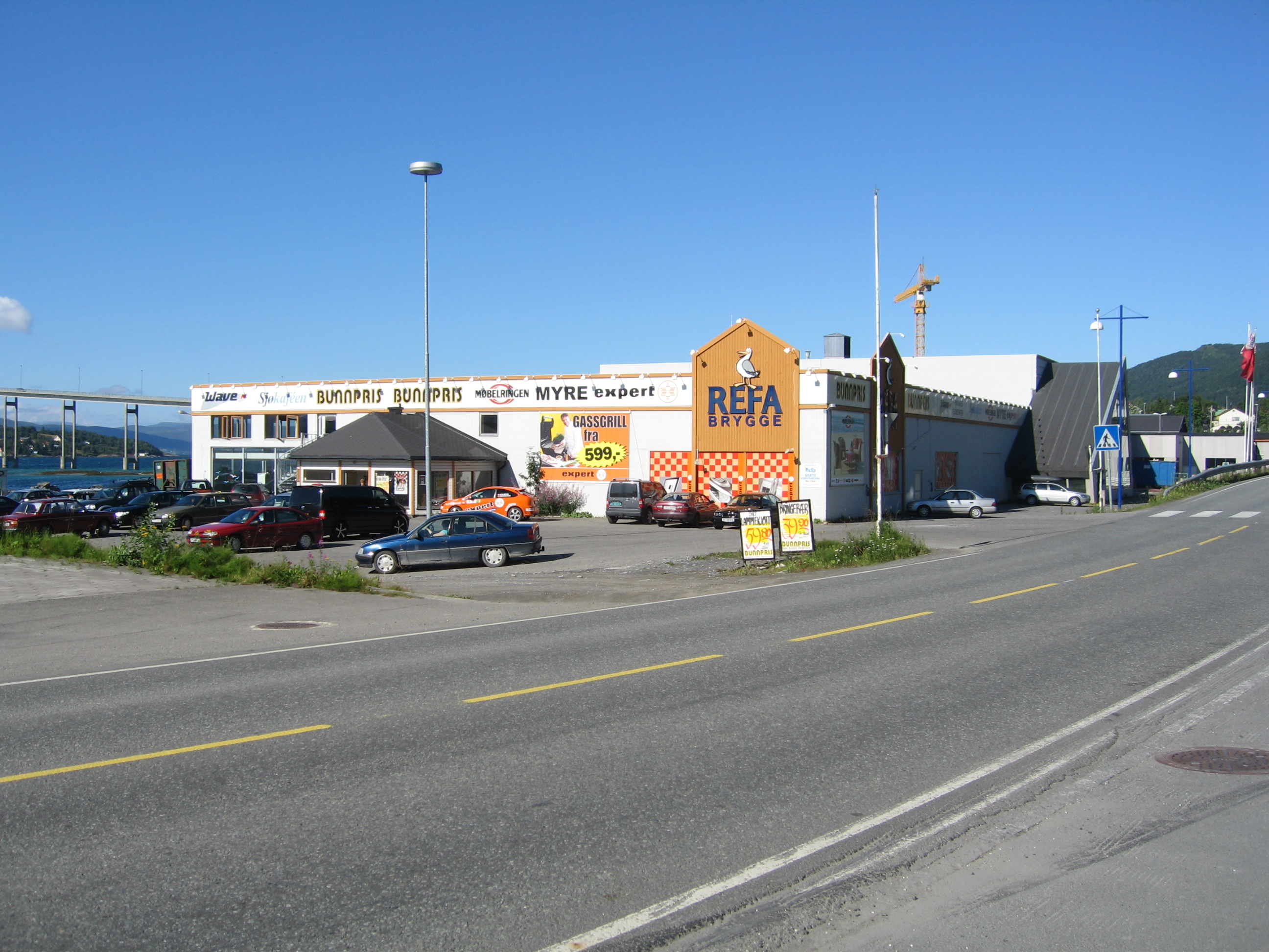 Kjøpesentret Refa Brygge på Nygård ved Finnsnes